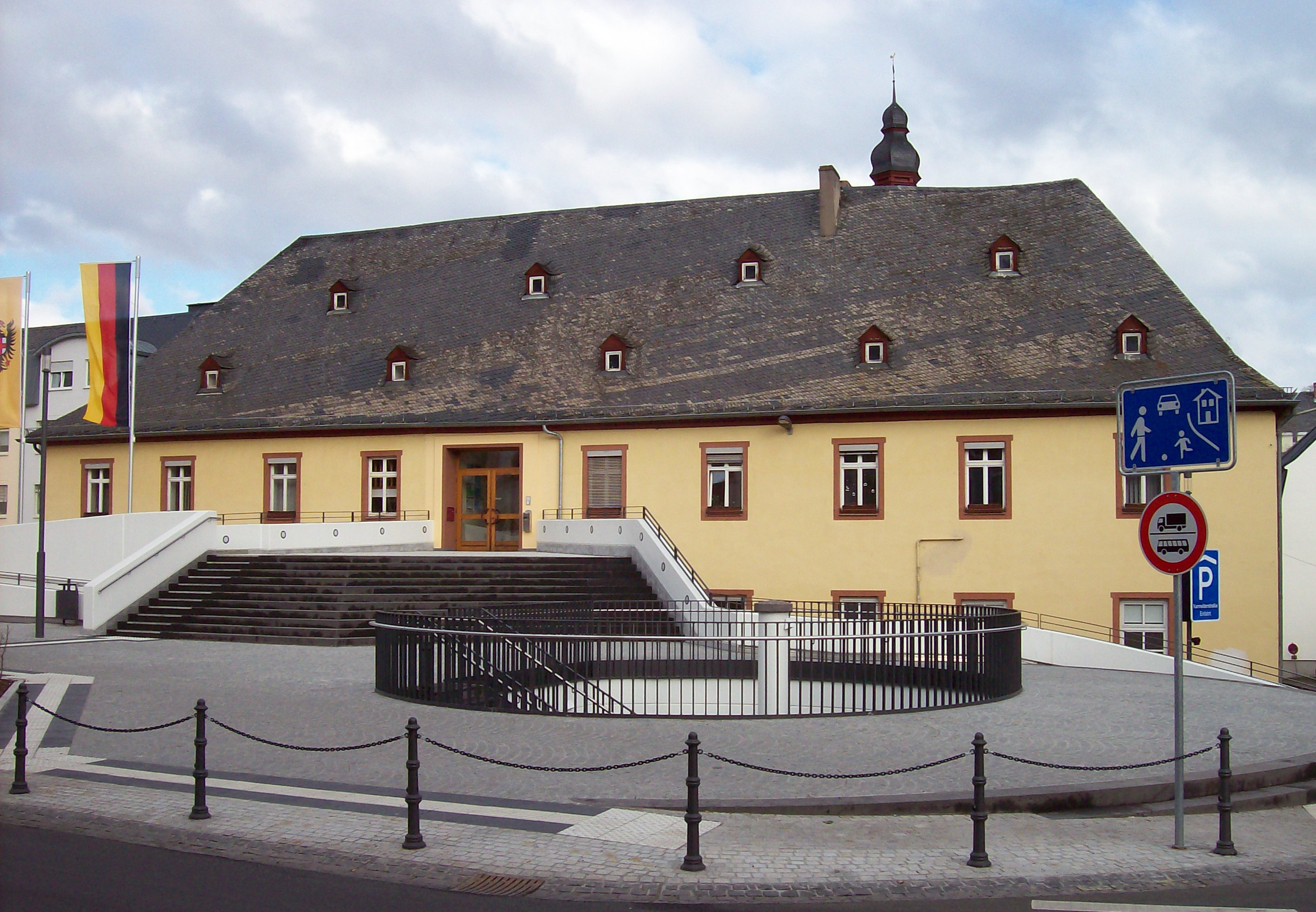 Karmeliterkloster von Boppard mit dem heutigen Haupteingang zur Stadtverwaltung. Die Treppe wurde im Jahr 2012 fertiggestellt.